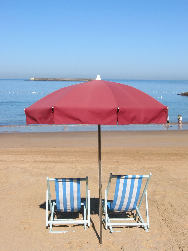 La plage de St Jean de Luz (France), prise le 14/09/04 par Harrieta171